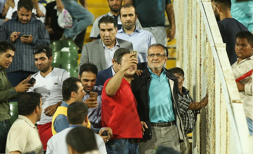 دیدار تیمهای فوتبال تراکتورسازی تبریز و سایپا تهران در چارچوب هفته چهارم لیگ برتر فوتبال، شامگاه جمعه ۲۶ مرداد ۱۳۹۷ در تبریز برگزار شد که این بازی با نتیجه یک بر صفر به سود تراکتورسازی به پایان رسید.